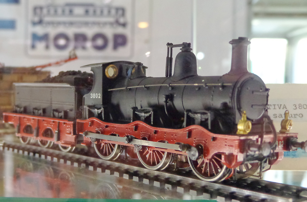 Modello artigianale in scala H0 della locomotiva FS 3802 (gruppo 380), esposto a Hobby Model Expo 2012